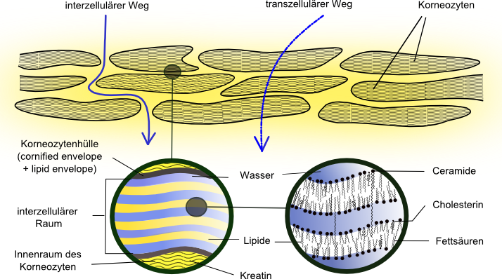 zwei der drei Transportwege von chemischen Stoffen durch das Stratum corneum